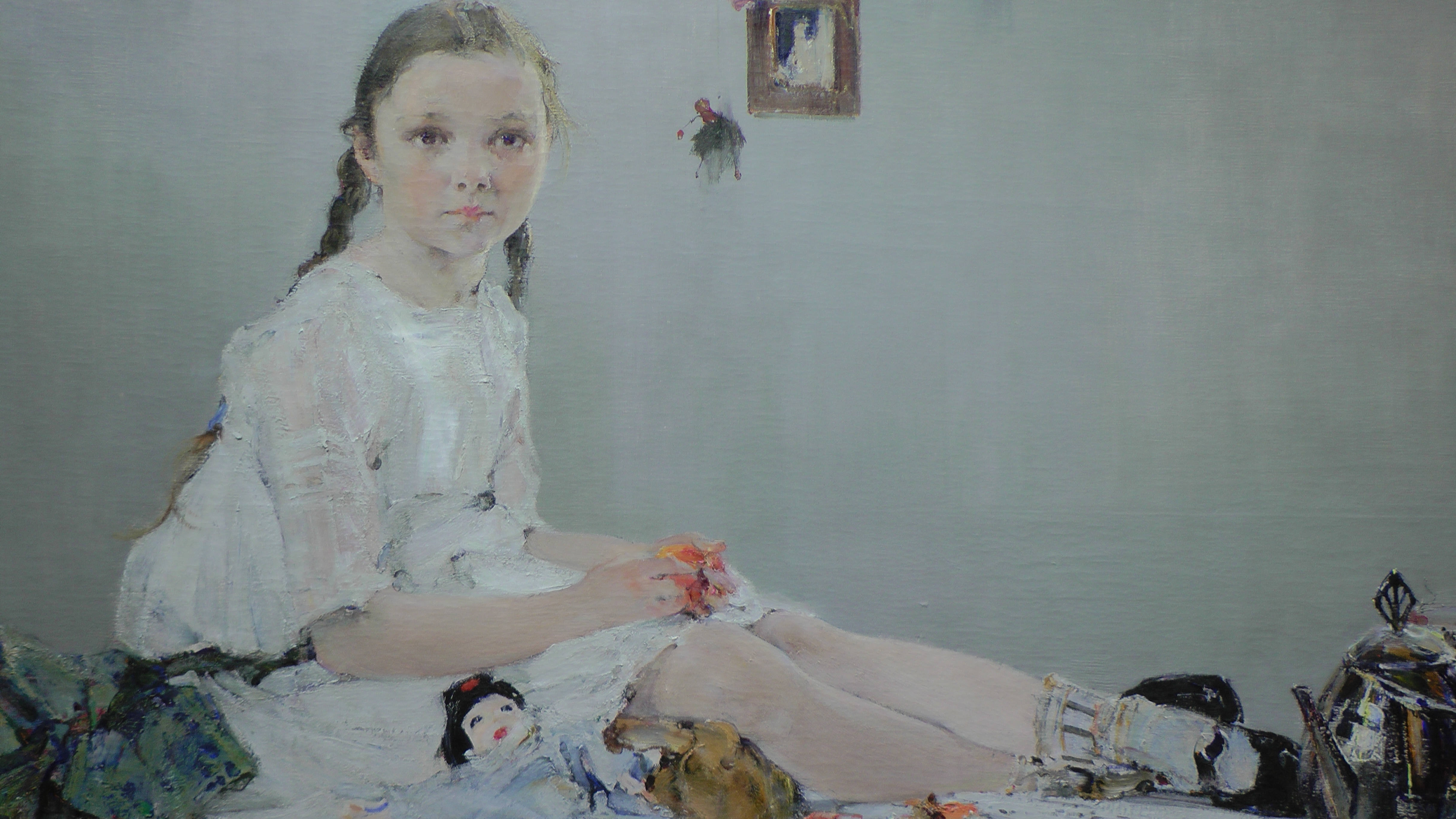 Николай Фешин. Портрет Вари Адоратской. Фрагмент (сидящая на столе девочка)